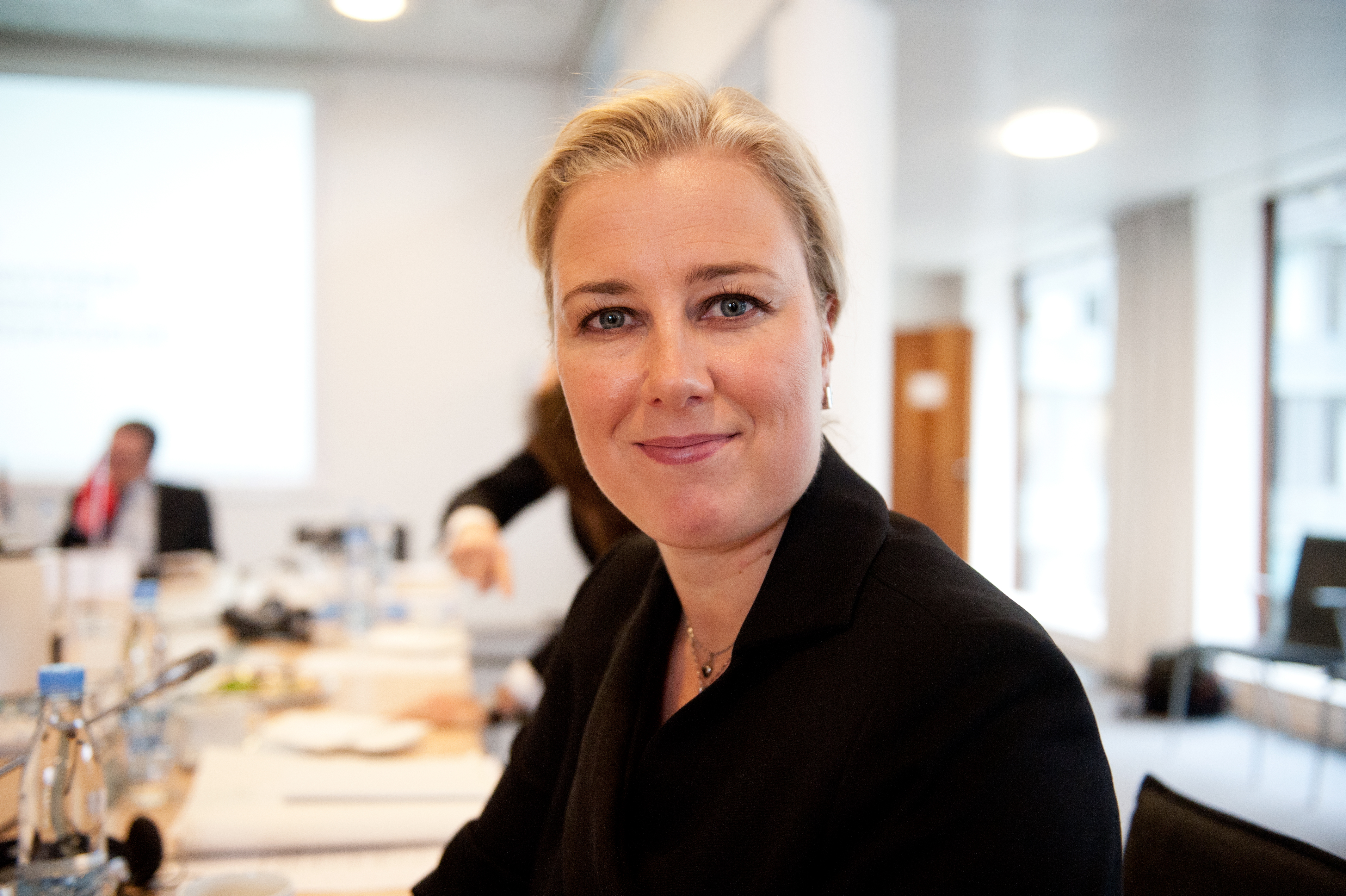 Finlands finansminister Jutta Urpilainen. Nordiska rådets session 2011 i Köpenhamn